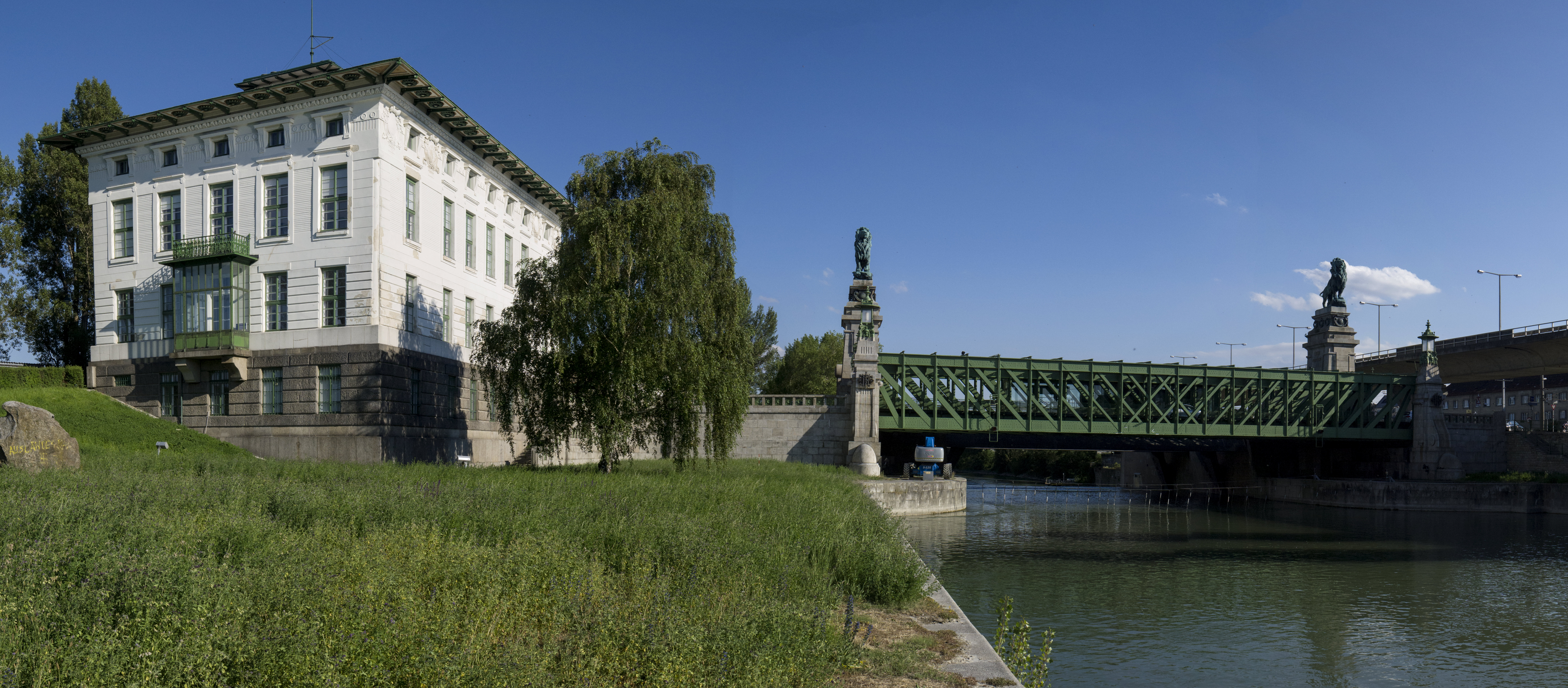 Straßenbrücke, Josef-von-Schemmerl-Brücke und Wehranlage Nußdorf